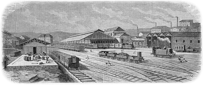 «Estação principal, em Alcantara»